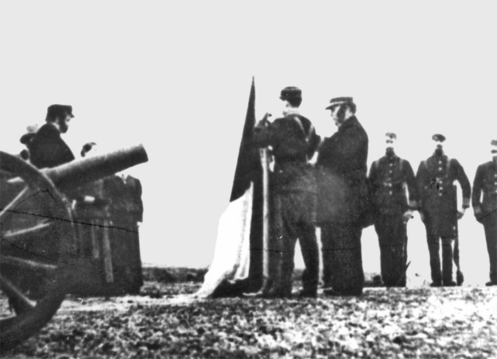 La Toma de posesión del estrecho de Magallanes, recoge los antecedentes y acciones que llevaron a la República de Chile a tomar posesión del estrecho de Magallanes y tierras adyacentes en 1843. Esta tarea le fue encomendada por el gobierno del general don Manuel Bulnes Prieto en abril de 1842 al recién nombrado intendente de Chiloé, comisario contador de la marina don Domingo Espiñeira Riesco y ejecutada por el marino nacionalizado chileno, capitán de fragata don Juan Guillermos, nacido como John Williams Wilson en Inglaterra, a la sazón capitán de puerto de San Carlos de Ancud.